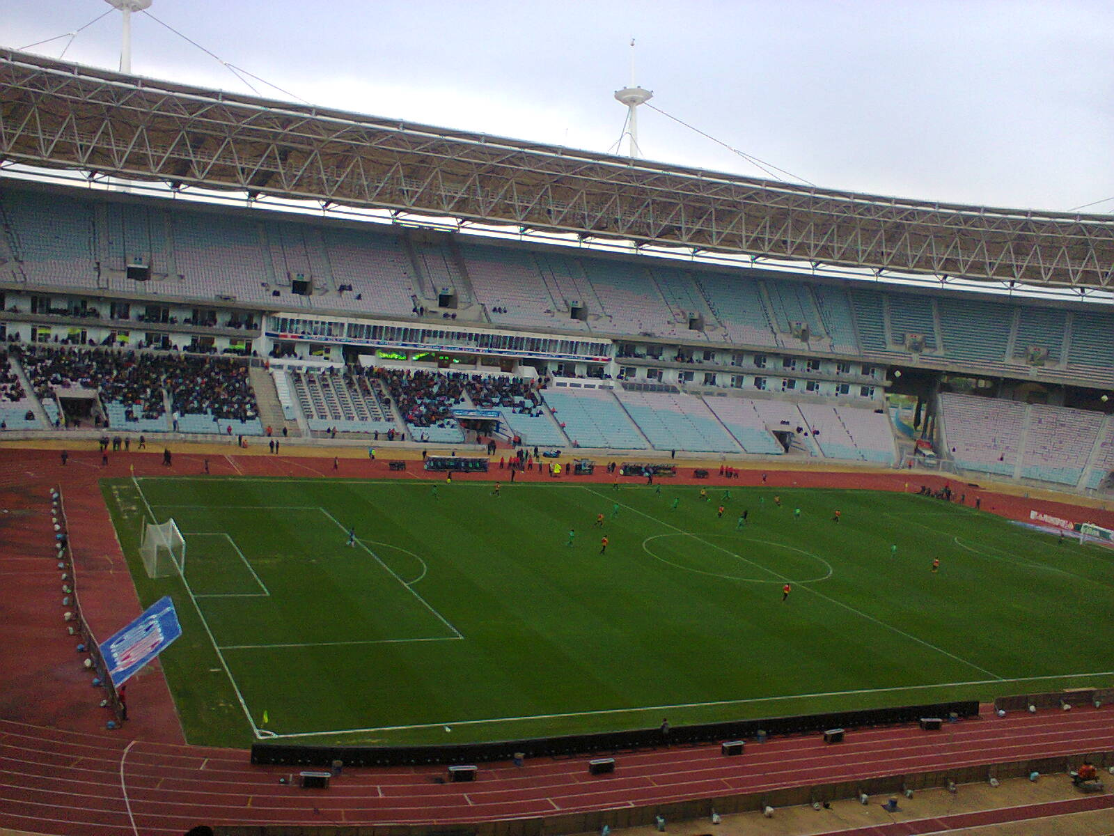 Stade de Radès pendant Espérance sportive de Tunis 5-0 Gor Mahia (Kenya) en Ligue des champions de la CAF 2014